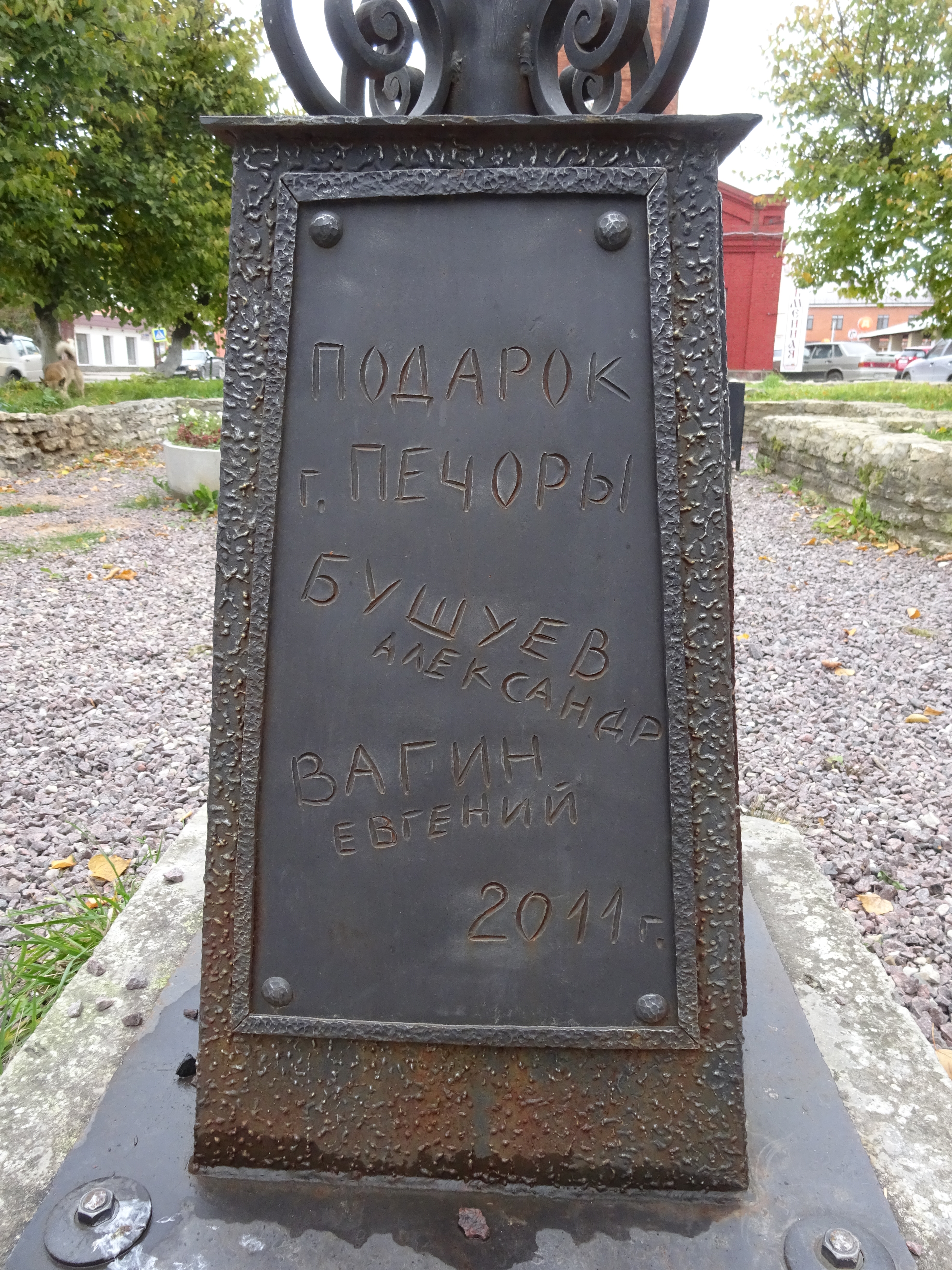 Памятник фонарю (фрагмент). Фото: Totbereg Communications, 2016.